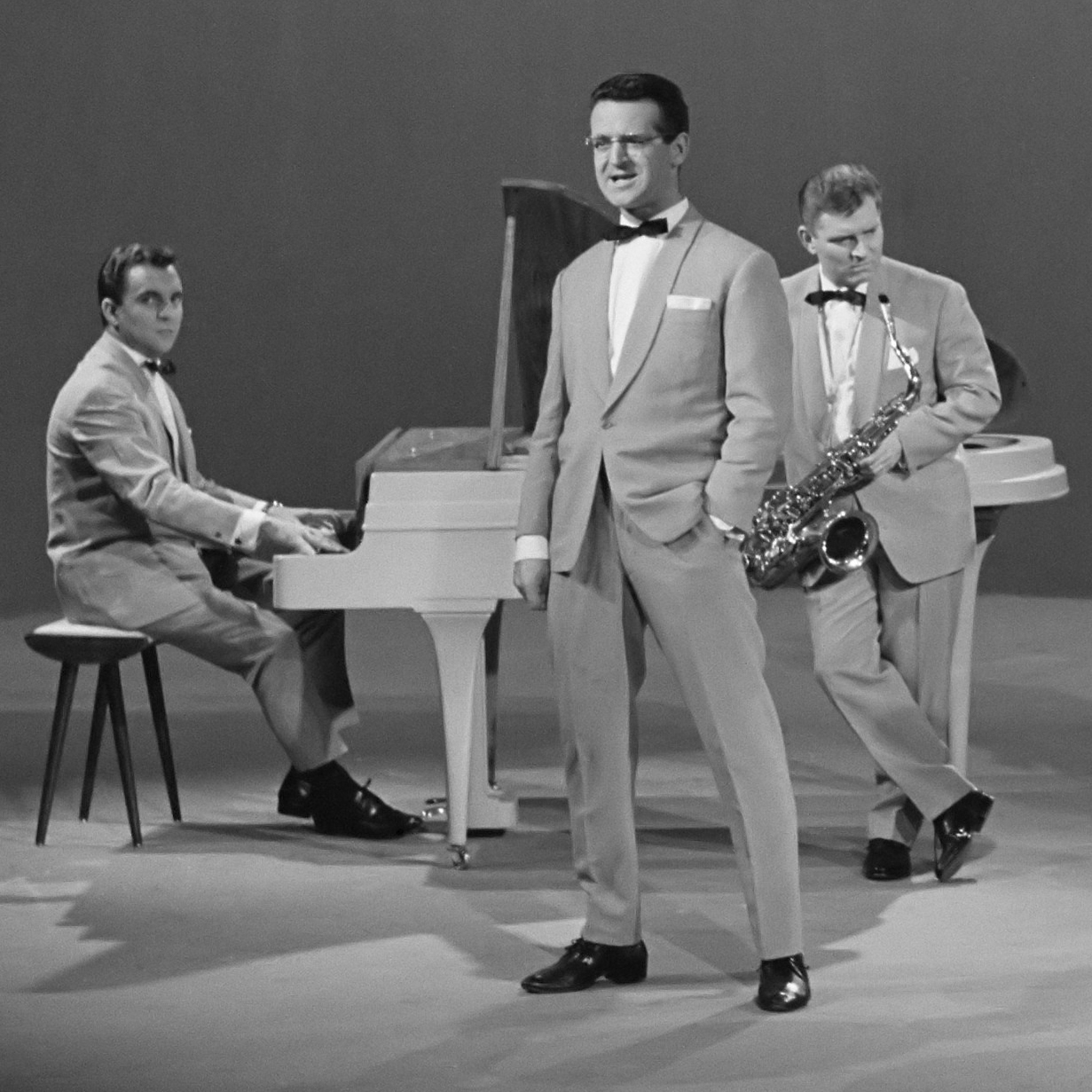 Opname van Hazy Osterwald in sextet in Cinetone 25 oktober 1961